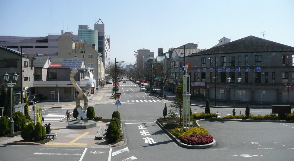 Ohmi Railway,Yokaichi Station plaza. / 近江鉄道八日市駅・駅前広場